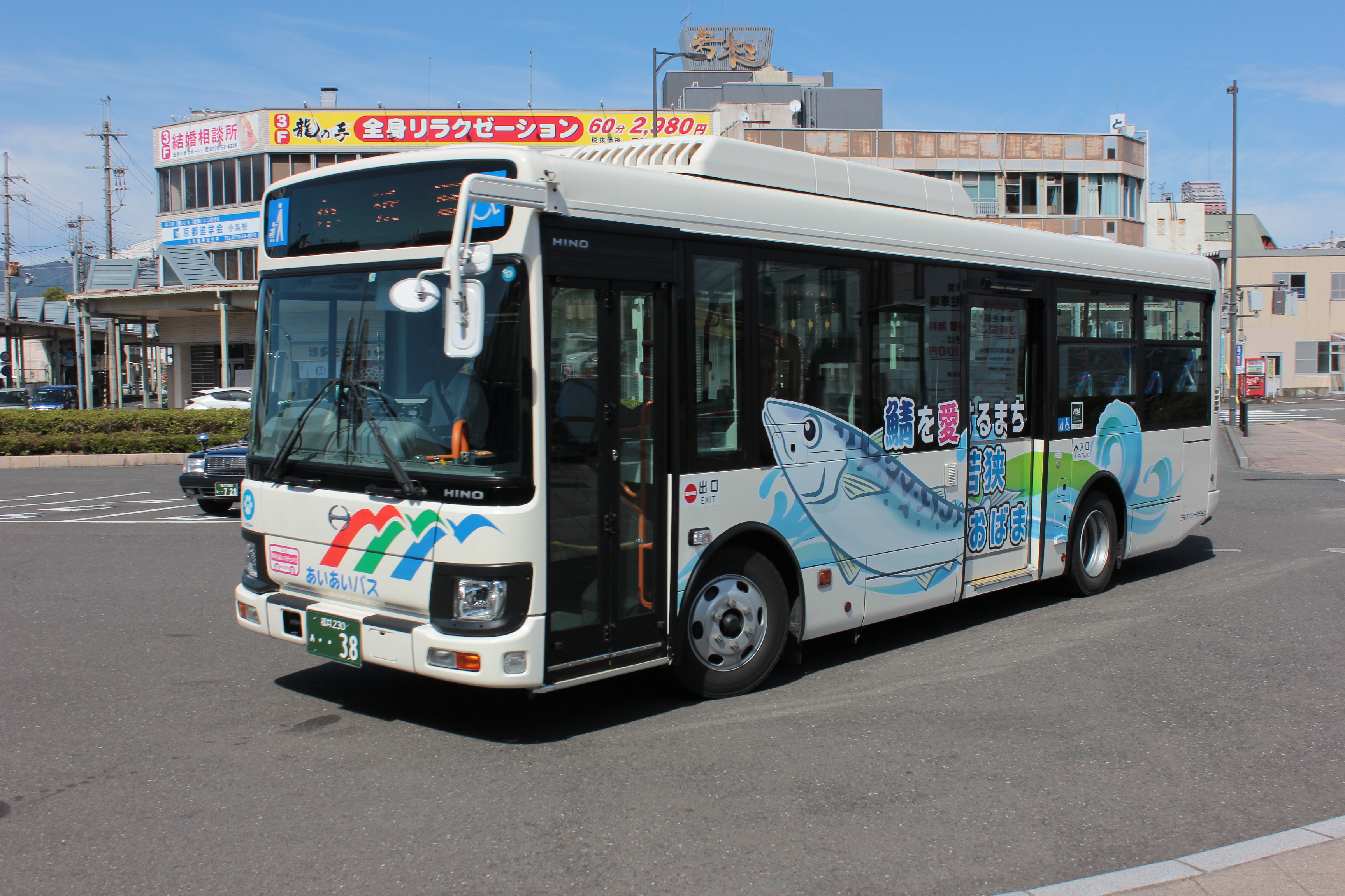 福井県小浜市のコミュニティバス「あいあいバス」（大型車両） Canon EOS Kiss X5